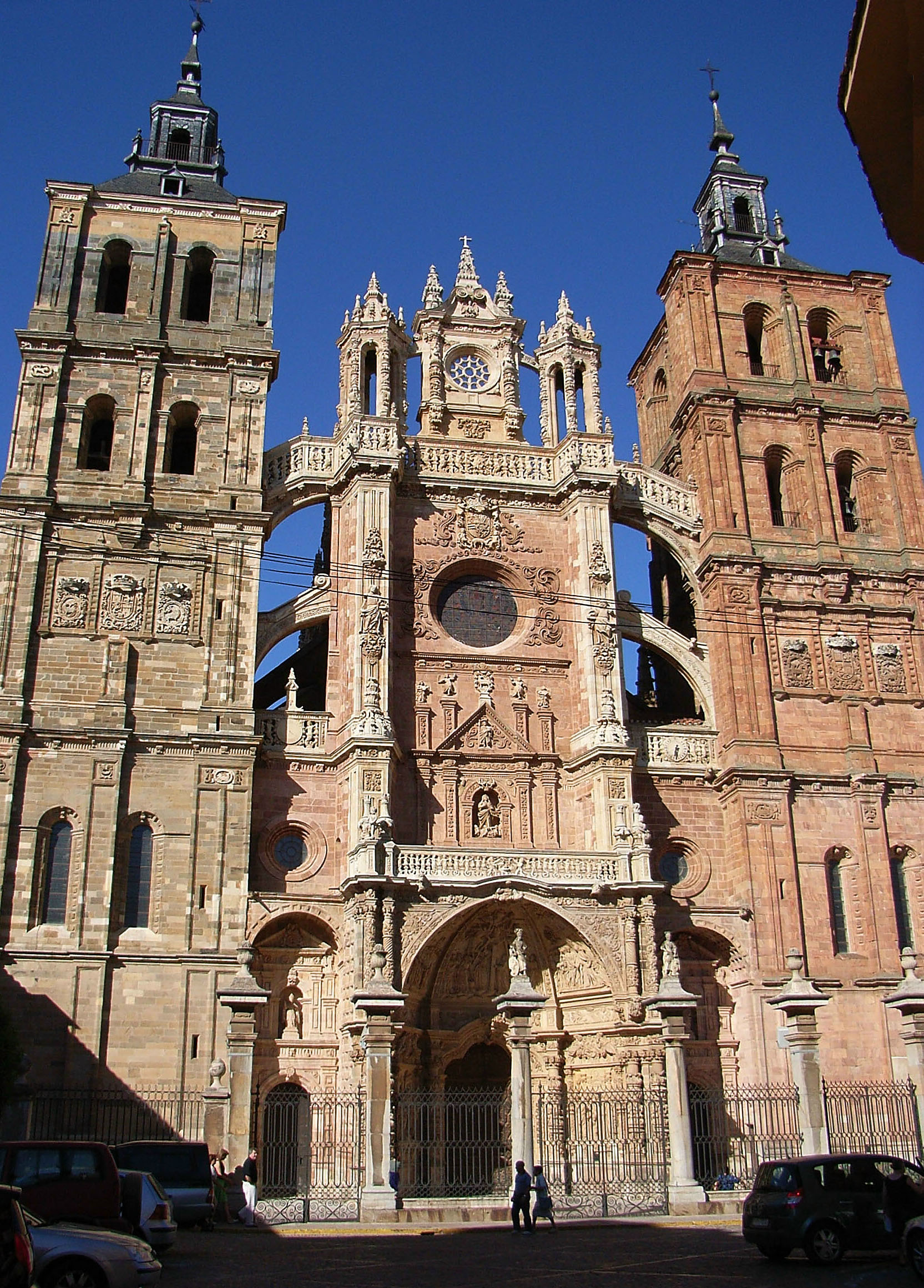 Fachada de la catedral de Astorga. Astorga Cathedral Astorga Cathedral Native nameCatedral de AstorgaLocationAstorga, provincia de León, (Spain)Coordinates42° 27′ 28″ N, 6° 03′ 25″ W EstablishedMiddle AgeWeb page control : Q2942496 VIAF: 145372555 LCCN: n88663709 BIC: RI-51-0000663 SUDOC: 060947012 JCyL: 4282 WorldCat institution QS:P195,Q2942496